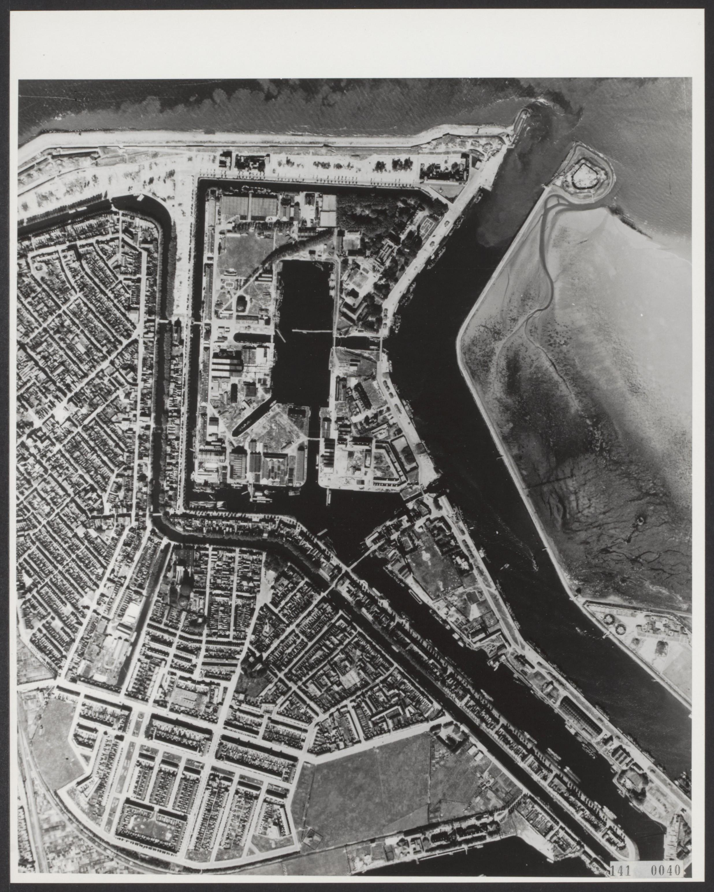 Luchtopname. De marinehaven van Den Helder. Middenboven ligt de Rijkswerf waarin ook de munitiefabriek staat die meer dan 100 keer het doelwit is van luchtaanvallen van de Geallieerden, zonder succes